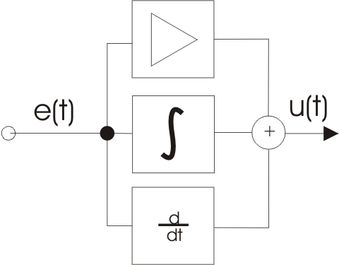 Schema PID regulátoru